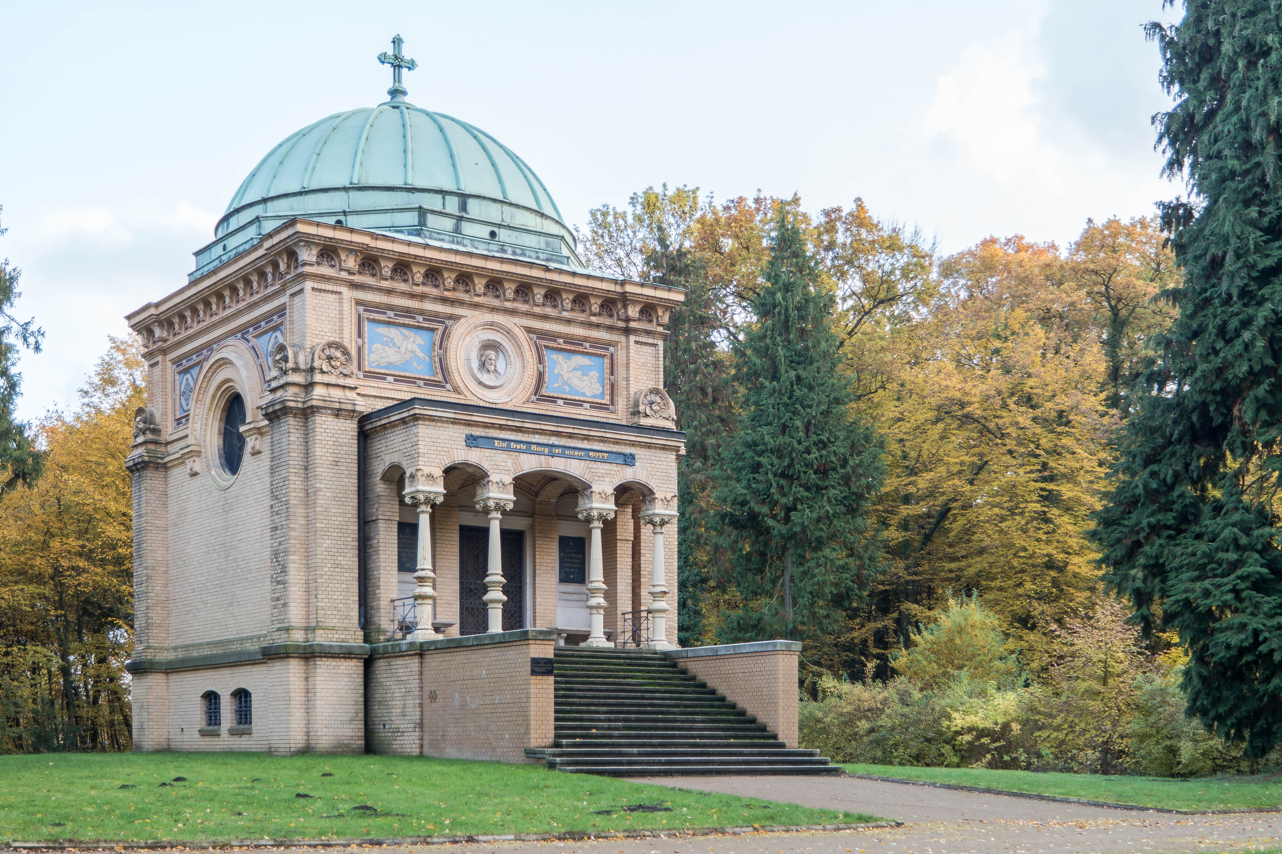 Mausoleum im Stadtpark von Tangerhütte